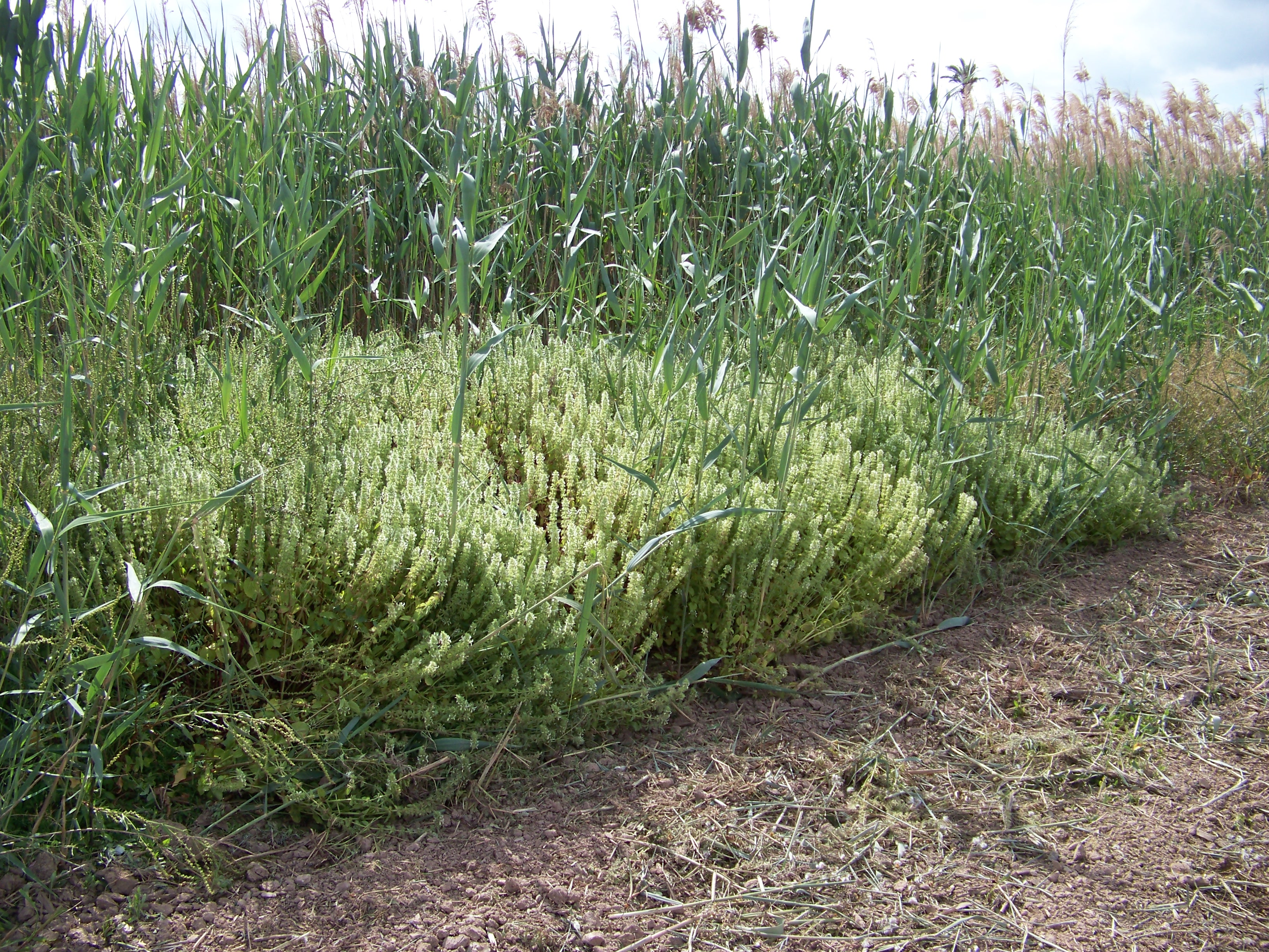 Stachys ocymastrum: bonita estación en Albatera (Alicante, España)